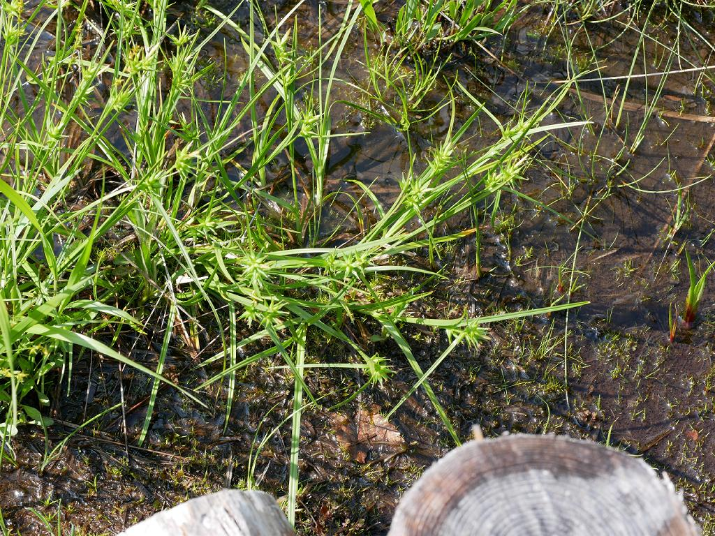 2019/06/20 群馬県：Gunma Pref. Japan